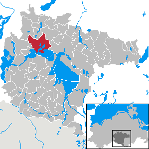 Jabel im Landkreis Müritz, Mecklenburg-Vorpommern